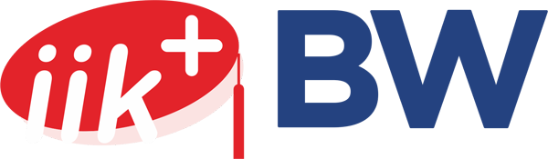 Logo resmi Institut Ilmu Kesehatan Bhakti Wiyata